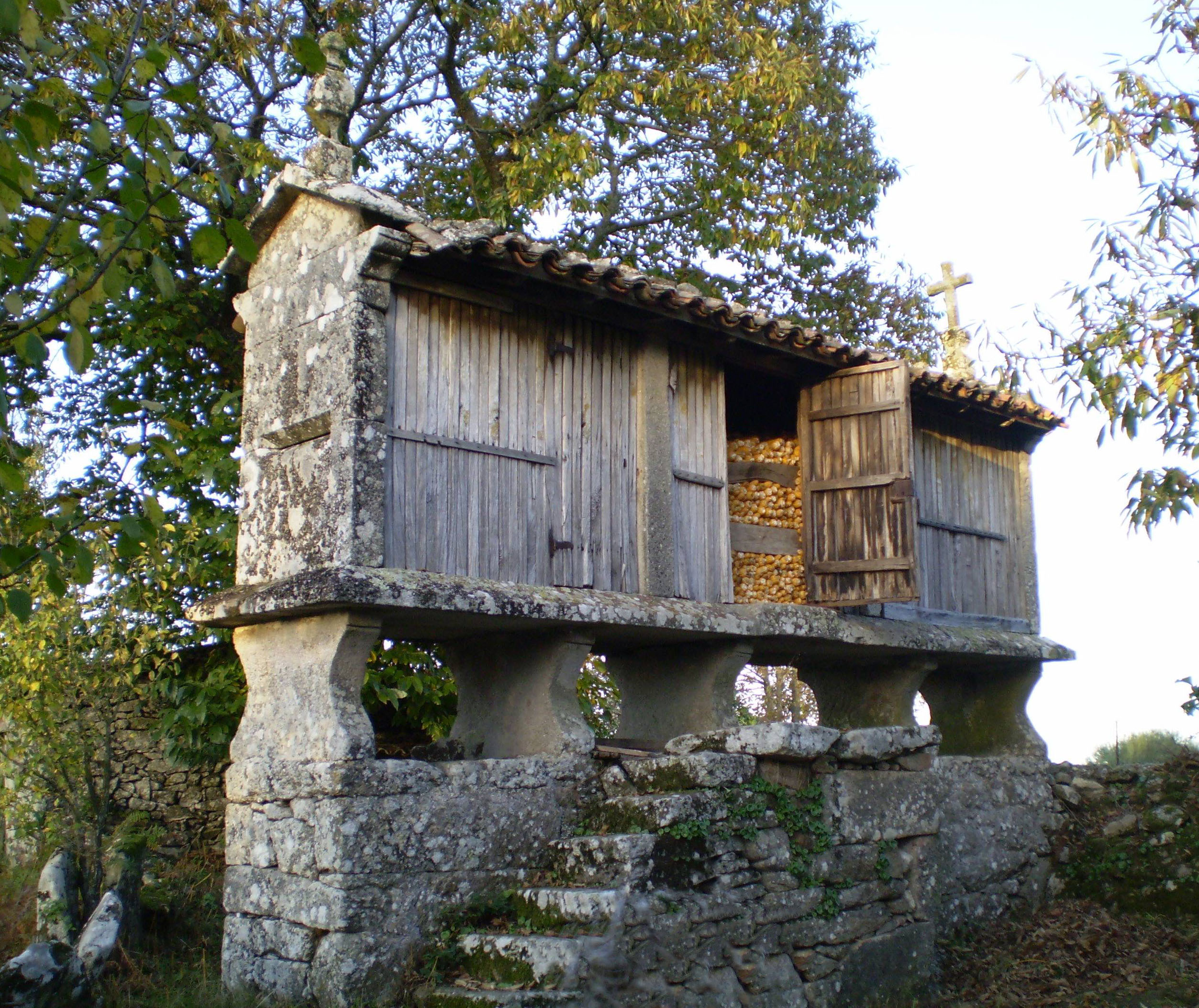 Hórreo tipo mahía, de tres claros , sobre soleira e catro cepas. Cruz e lampión. Ubicado no Castro de Amarante (Antas de Ulla)